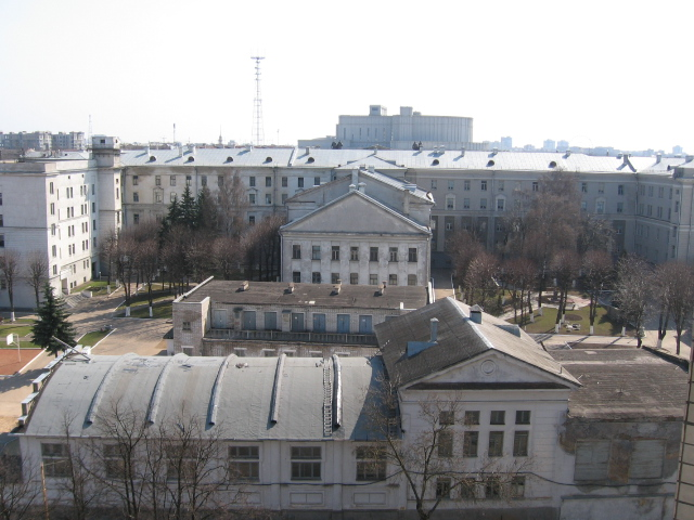 Вид сверху, с 11-го этажа, на двор Минского суворовского военного училища